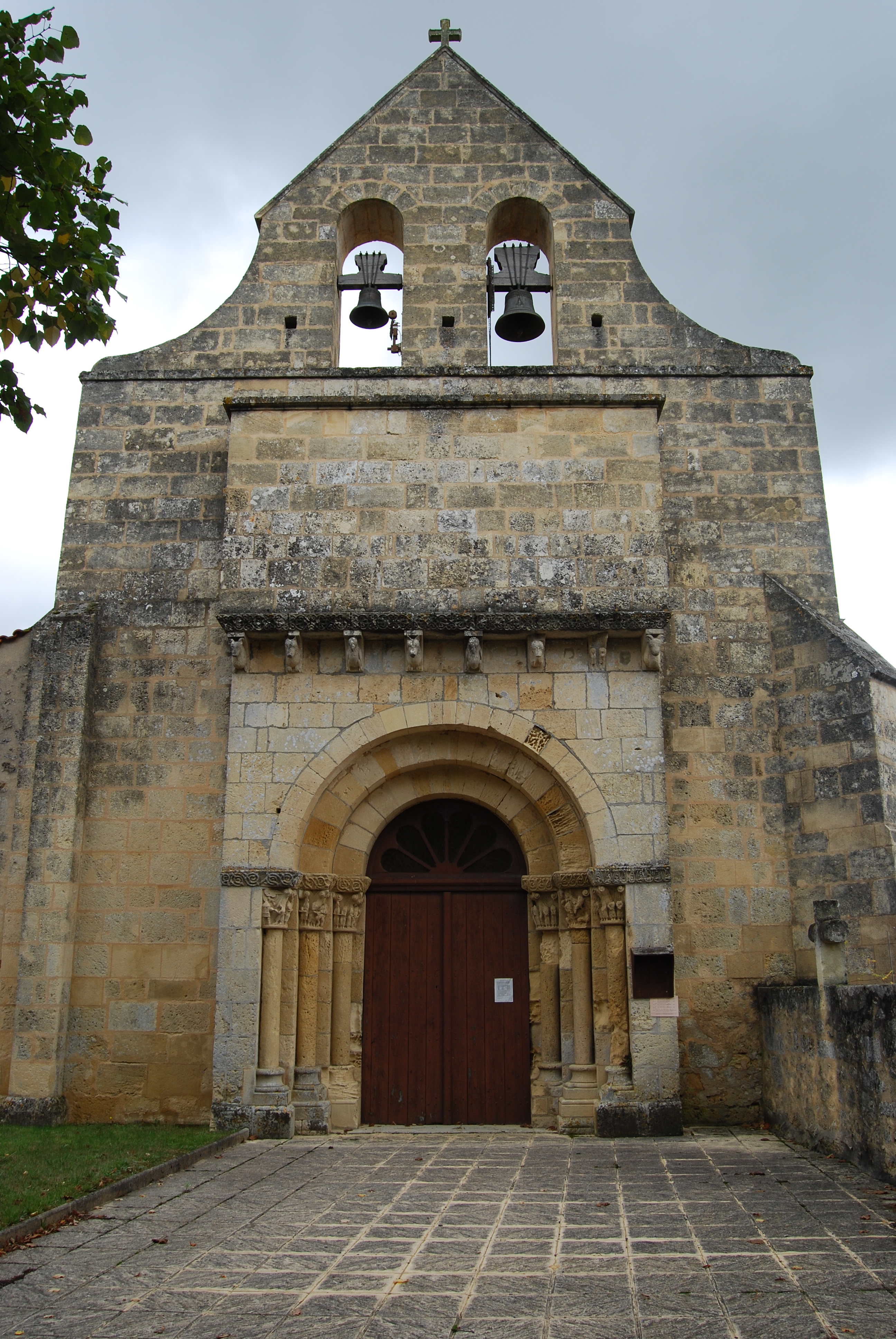 Église Saint-Romain de Cessac, (Classé, 1908) .